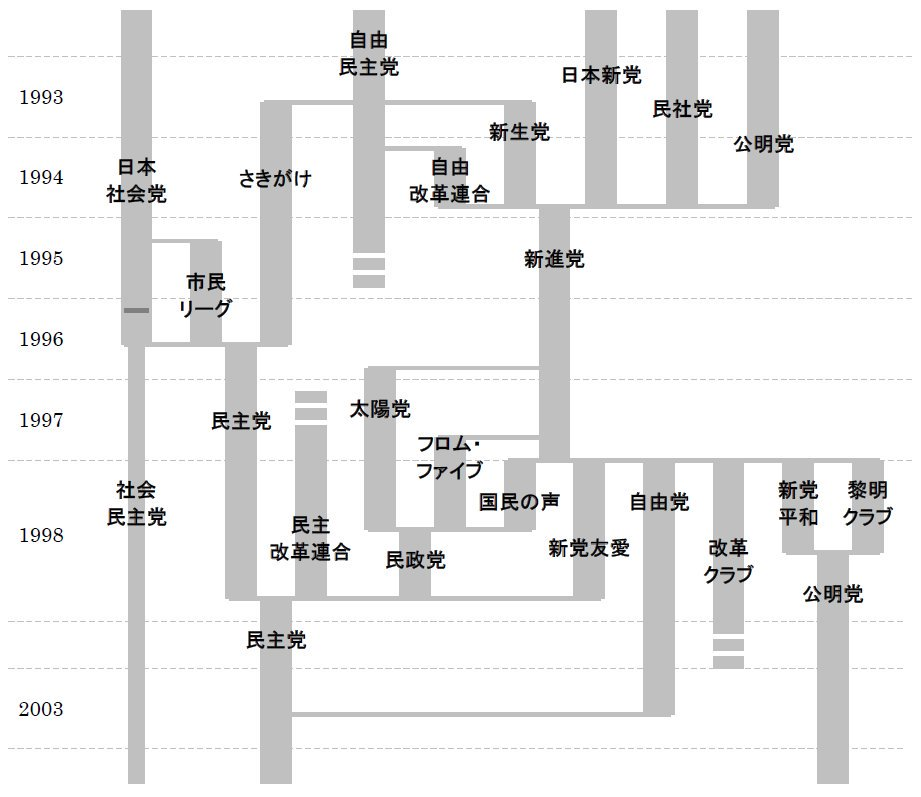 1990年代の政党の離合集散（日本社会党, 社会民主党, 市民リーグ, 新党さきがけ, 自由民主党, 自由改革連合, 新生党, 日本新党, 民社党, 公明党, 新進党, 民主党, 民主改革連合, 太陽党, フロム・ファイブ, 国民の声, 民政党, 新党友愛, 自由党, 改革クラブ, 新党平和, 黎明クラブ）